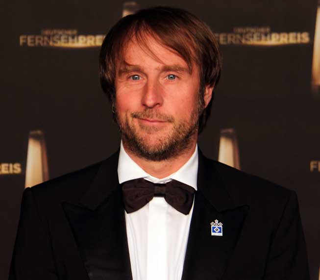 Bjarne Mädel beim Deutschen Fernsehpreis 2012